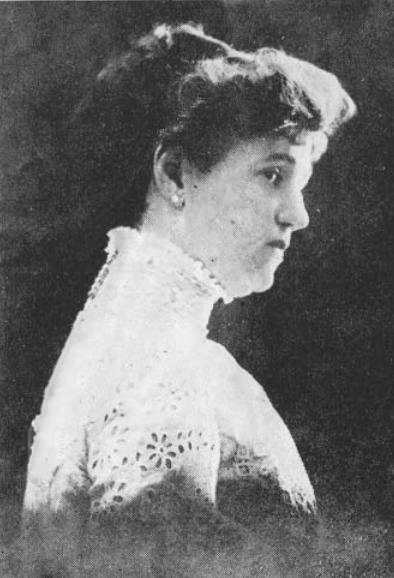 Mariana Cox Méndez -conocida como Mariana Cox de Stuven o por sus seudónimos literarios Shade y Oliver Brand- (Punta Arenas, 1871 - París, 8 de septiembre de 1914)fue una escritora feminista, ensayista y novelista chilena.